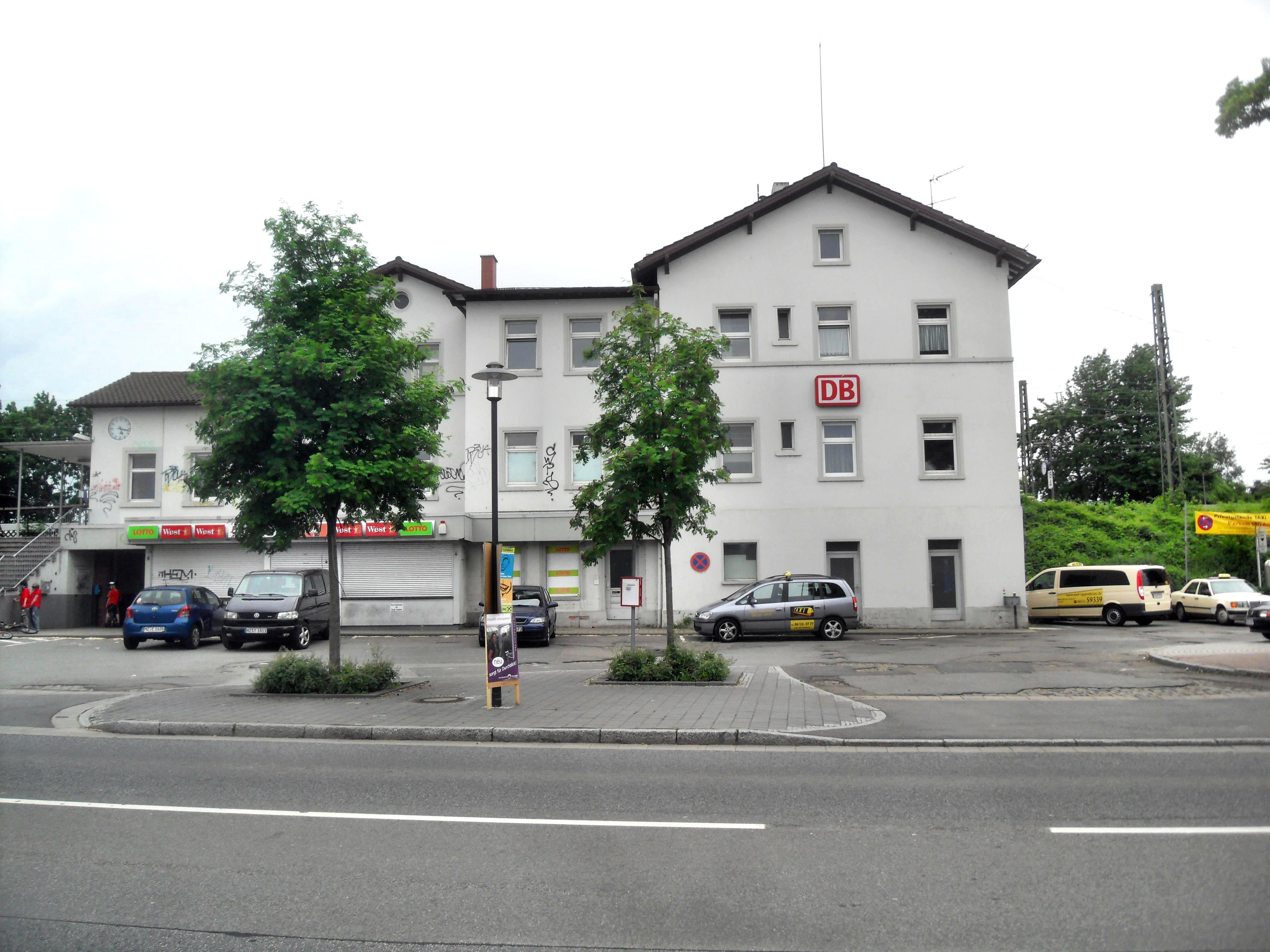 Der Niersteiner Bahnhof in Rheinhessen (Deutschland)